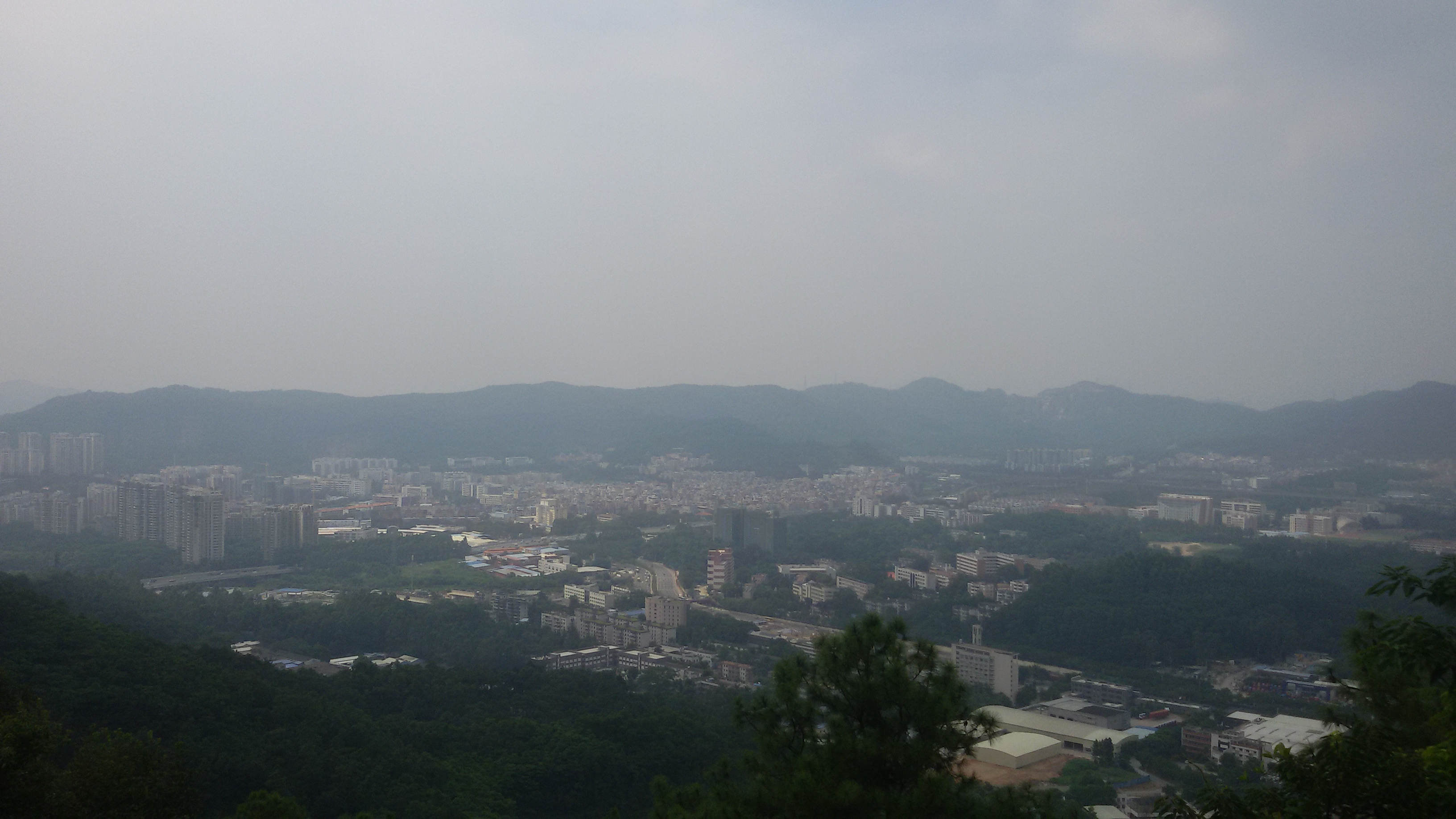 粵語: 喺火爐山上嘅豬頭石景區望過去龍眼洞嗰頭